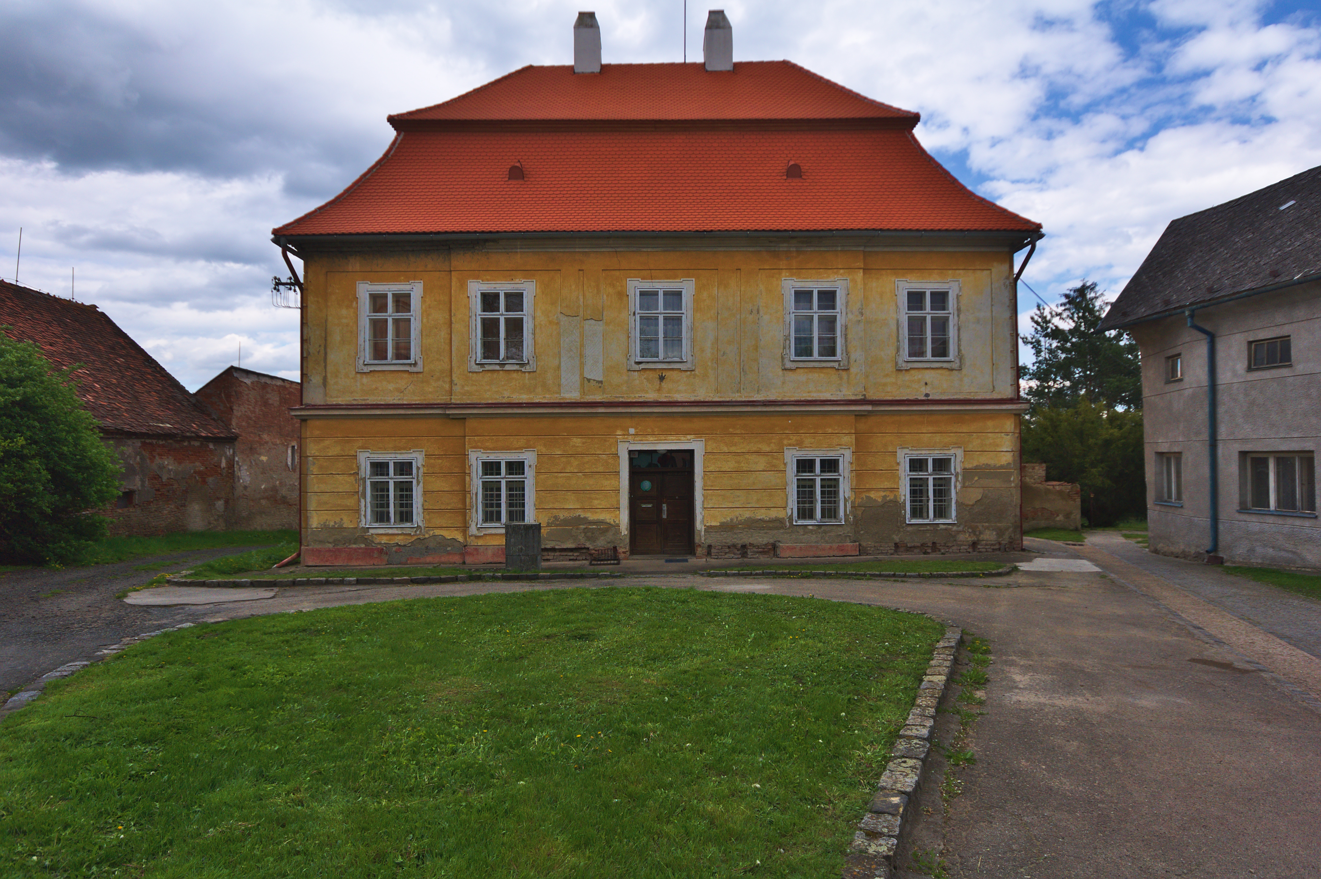 Fara, Nezamyslice, okres Prostějov